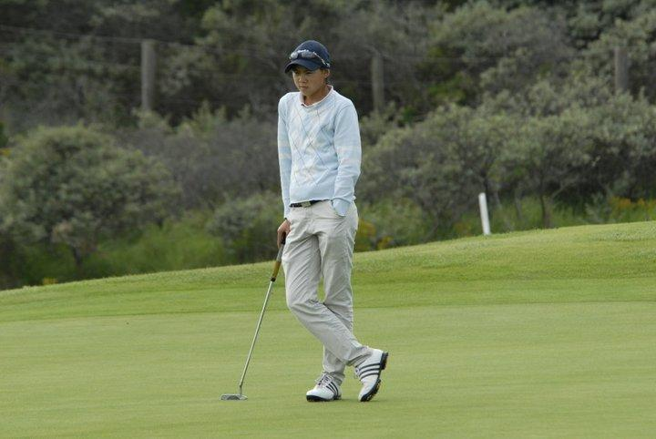 Zhen Bontan, winnaar Lochems Jeugd Open 2011